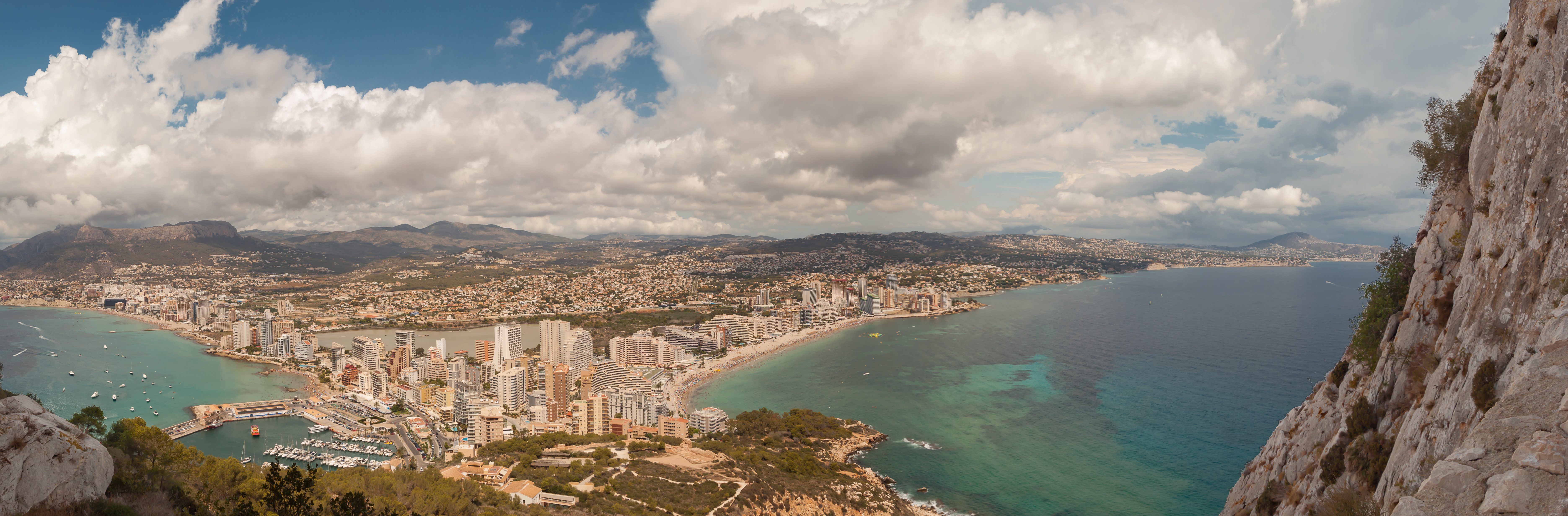 Calp desde el Peñón de Ifach